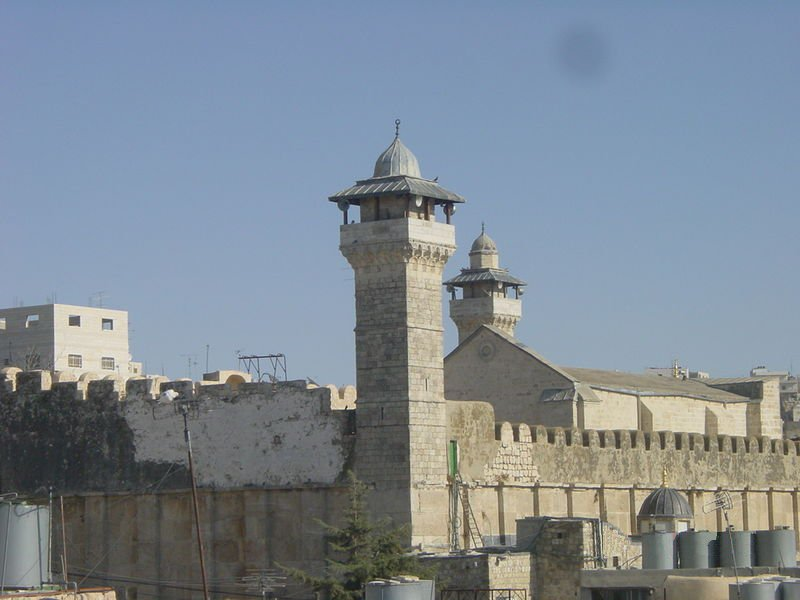 Abraham-Mosche, Ort des Massakers, selbst fotografiert im November 2003, gemeinfrei